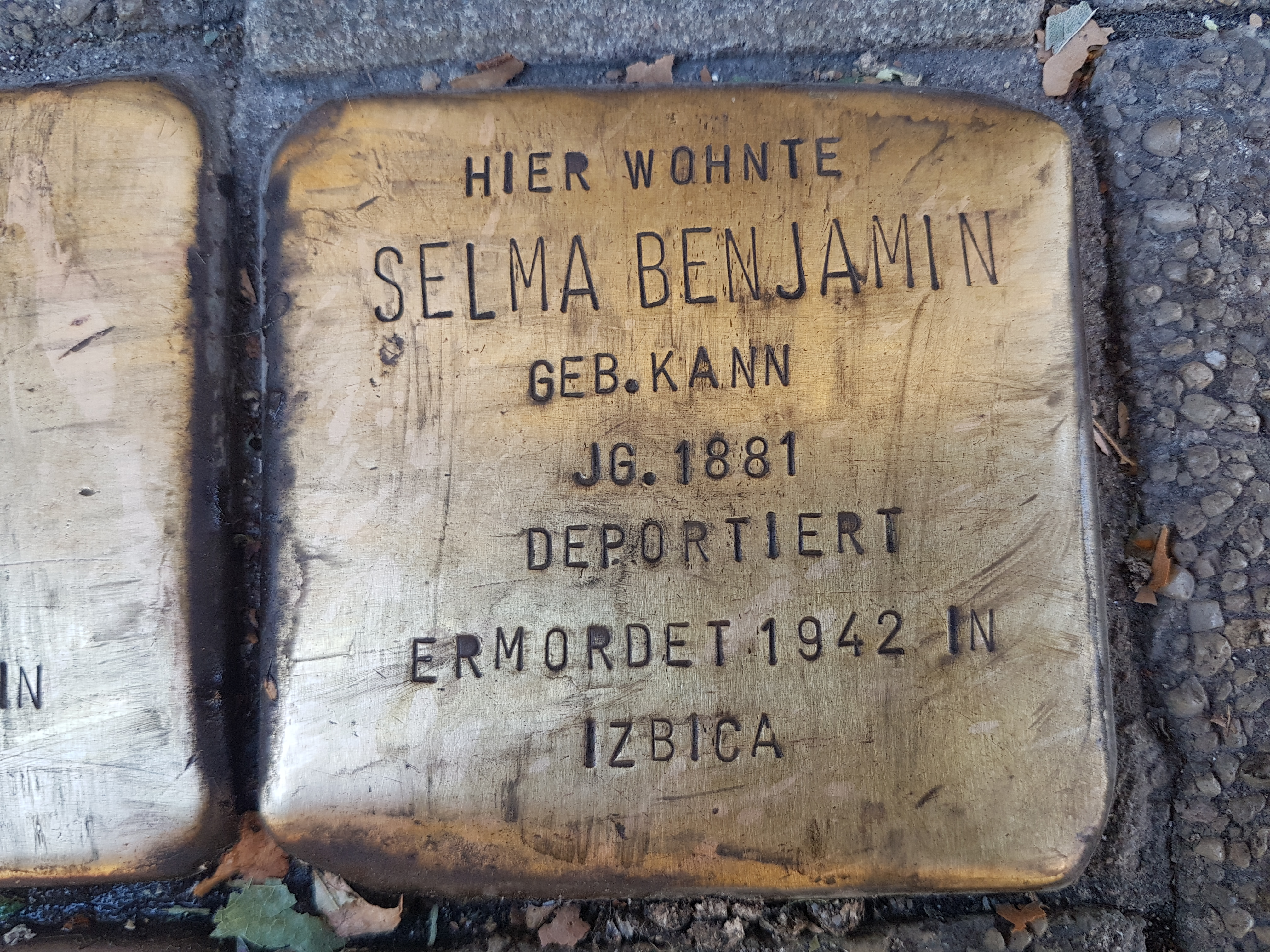 Stolperstein Duisburg Selma Benjamin